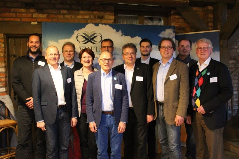 Vorstand des VDFU (Stand: Juli 2015)